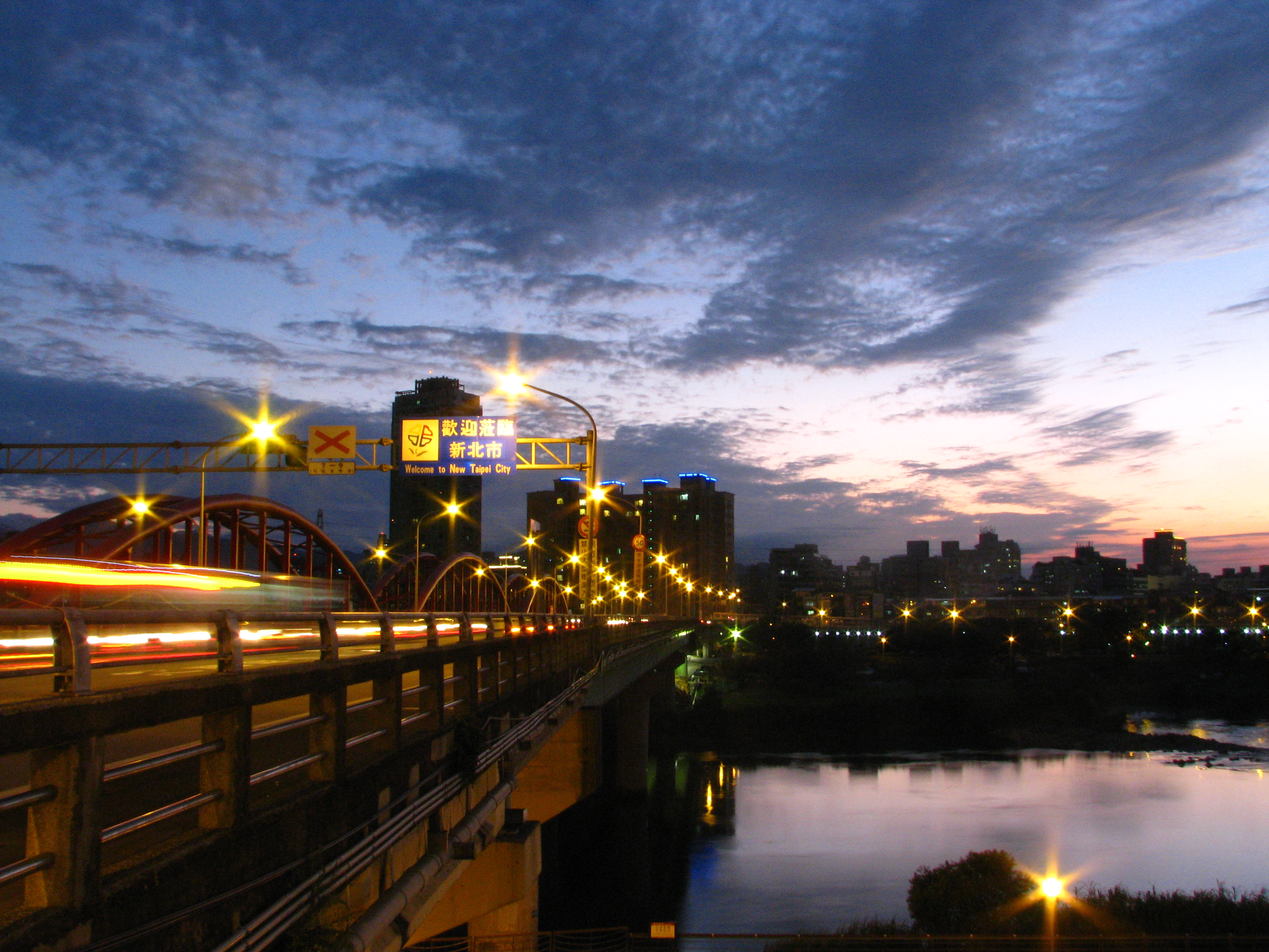 由台北市端拍攝永福橋。